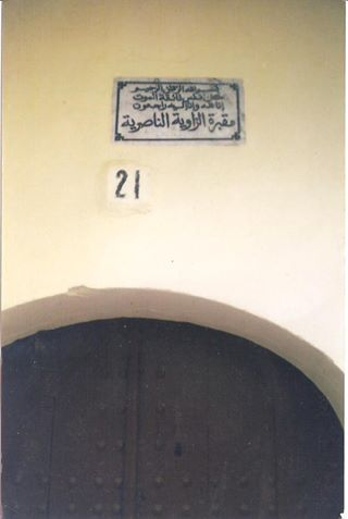 Zaouia Naciria à Meknès